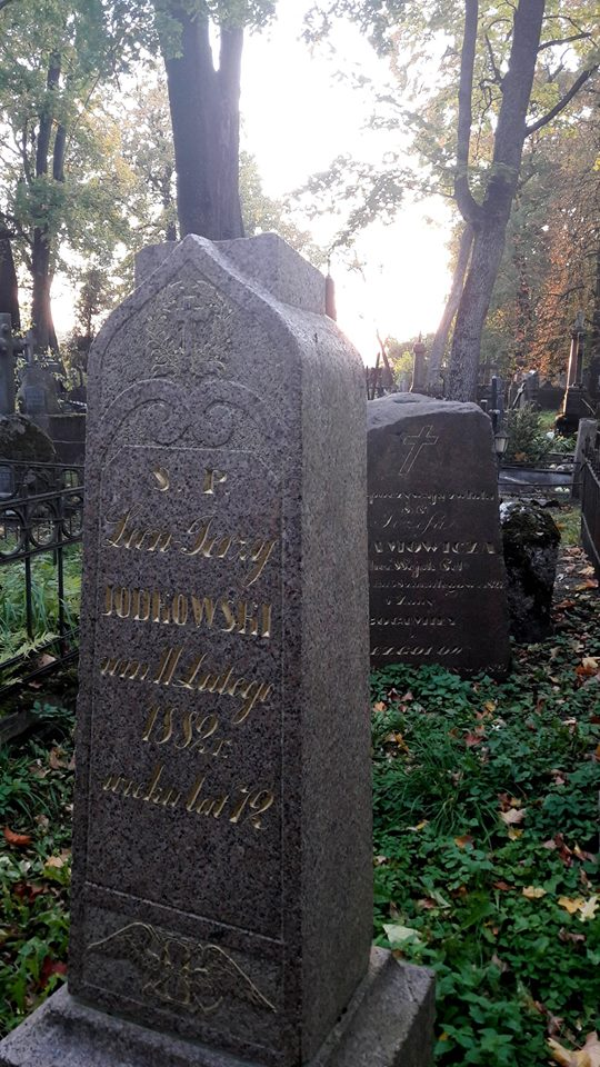 Leono Jurgio Jodkovskio antkapis Bernardinų kapinėse, Vilniuje.